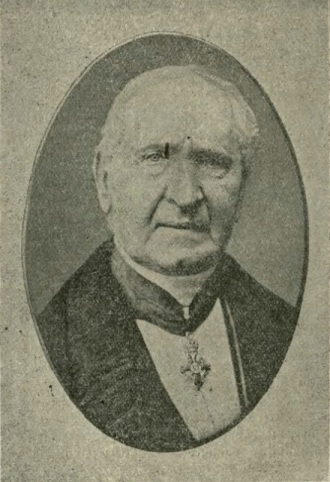 Superintendent Carl Samuel Schneider